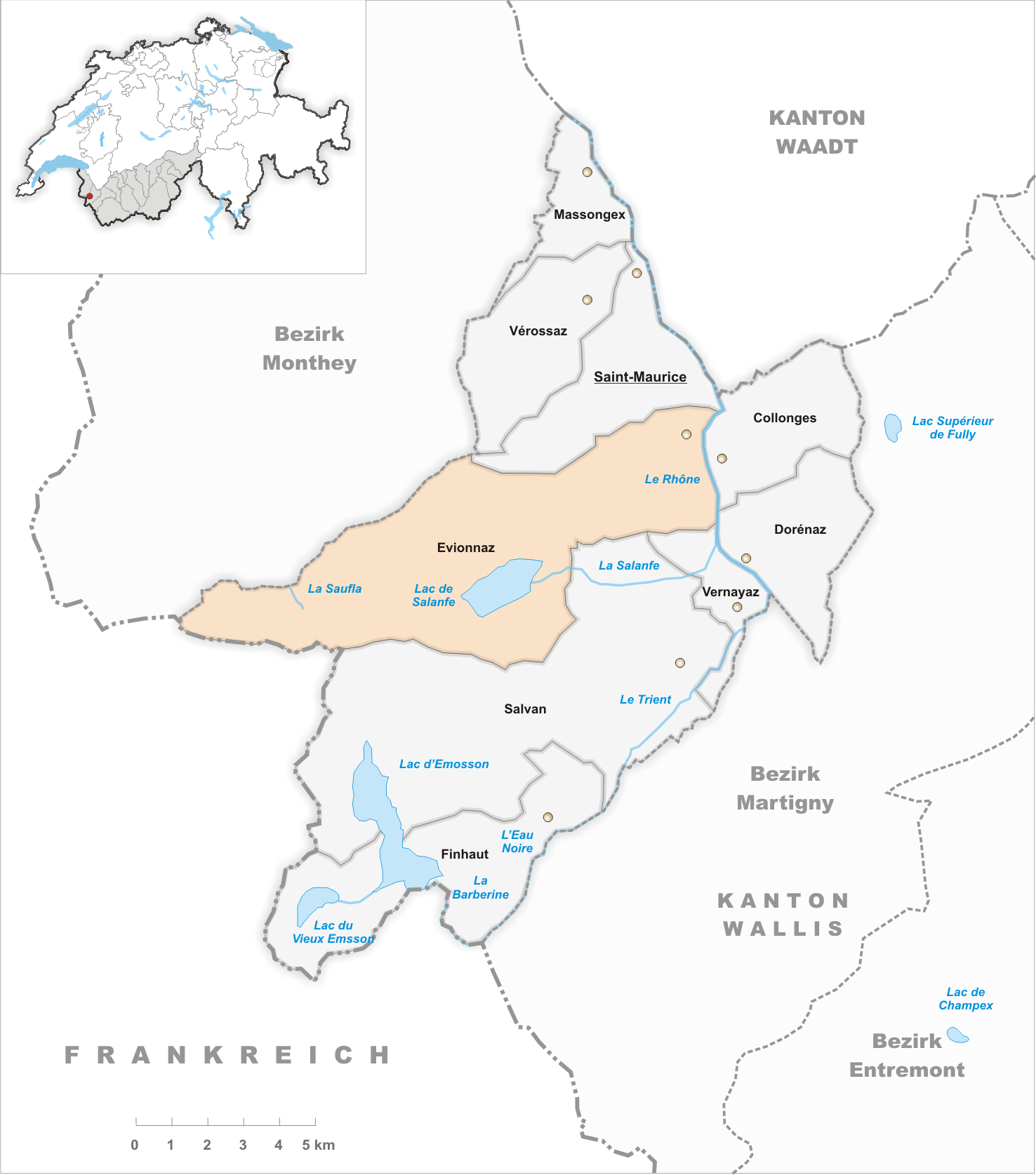 Municipality Evionnaz